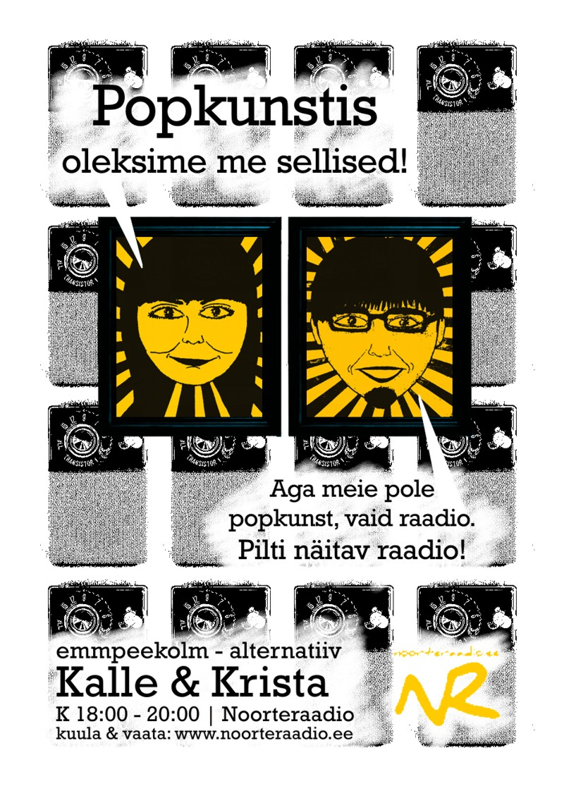 Noorteraadio saate EmmPeeKolm - Alternatiiv" reklaam